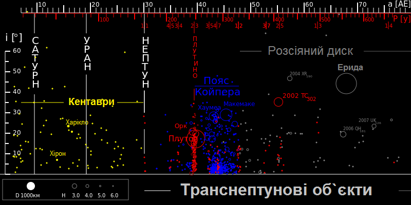 Розподіл і класифікація транснептунових об'єктів на 73-х астрономічних одиницях.